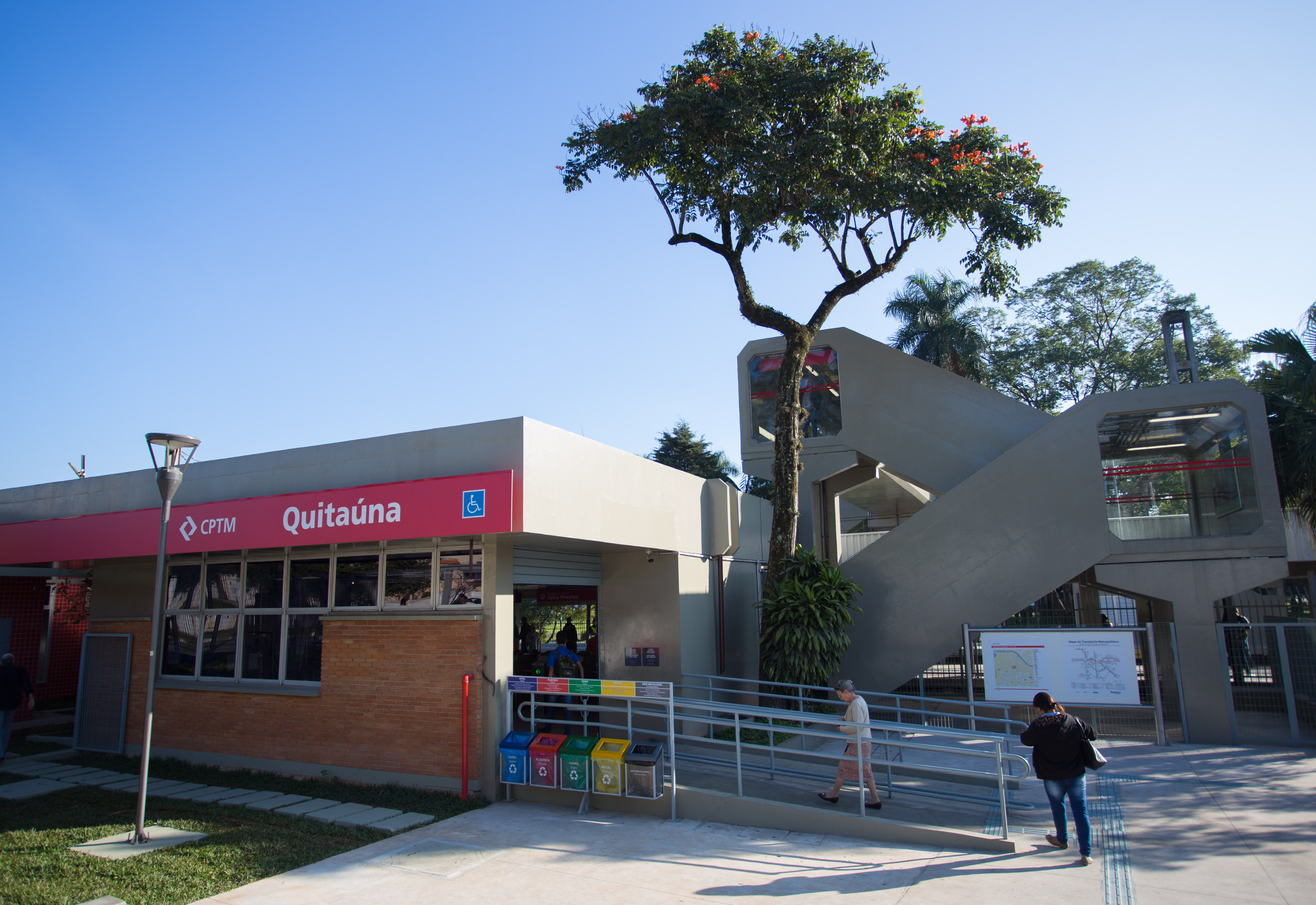 O Governador Geraldo Alckmin, participa da entrega da Estação Quitaúna Osasco - Linha 8 CPTM.DATA 26/06/2017. LOCAL: Osasco/SP. FOTO: Diogo Moreira